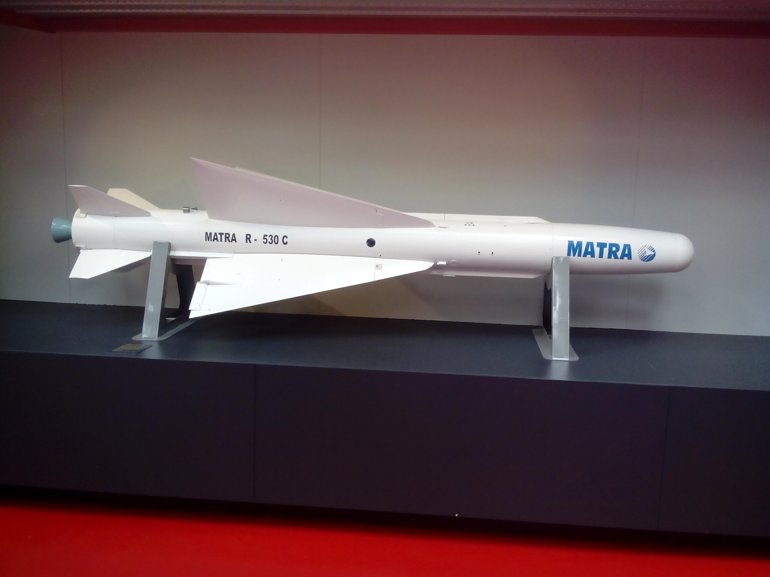 Missile Matra R-530 C présenté au musée du Bourget